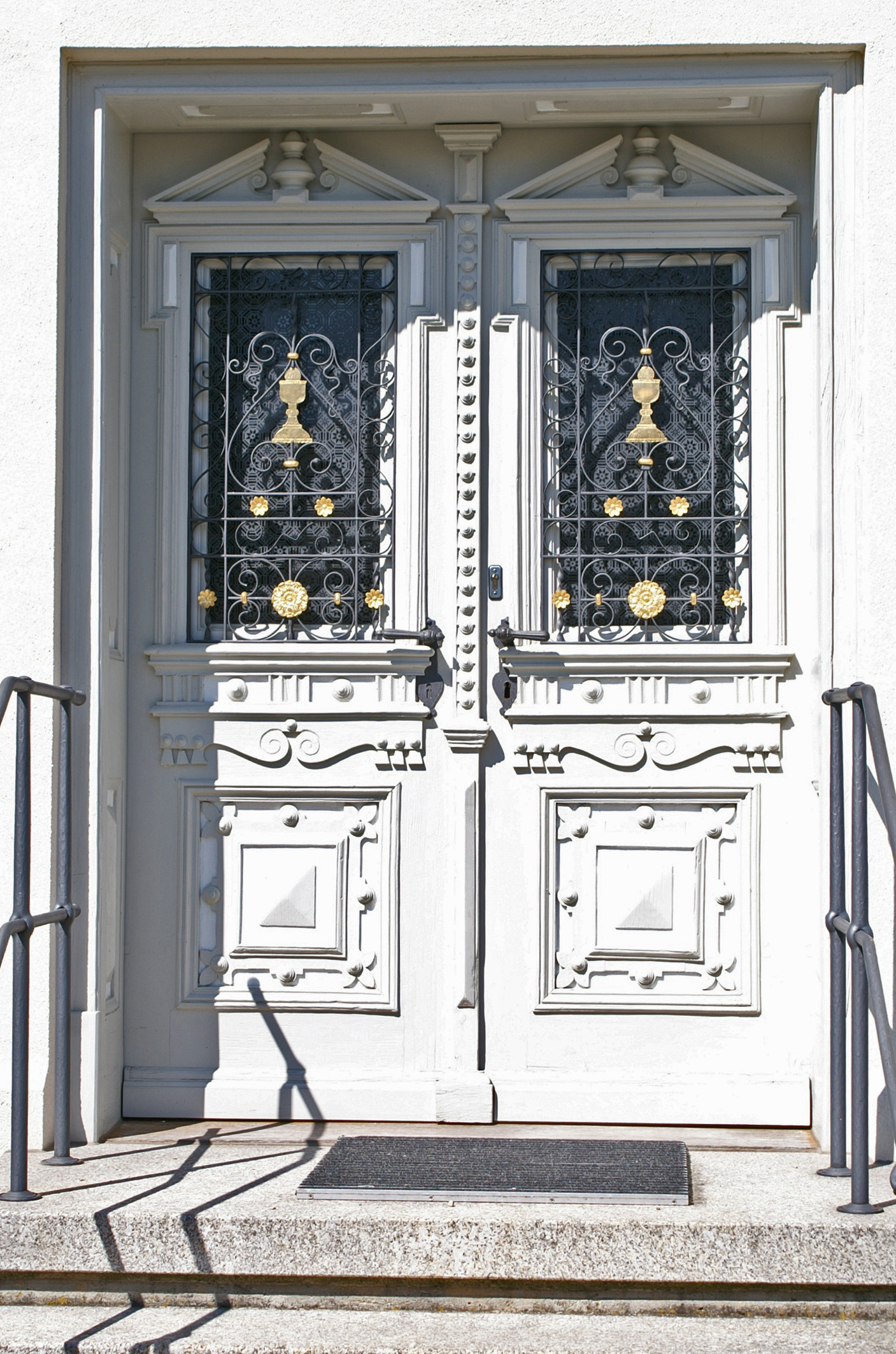 Tür des Pfarrhofs in Immelstetten, Markt Wald